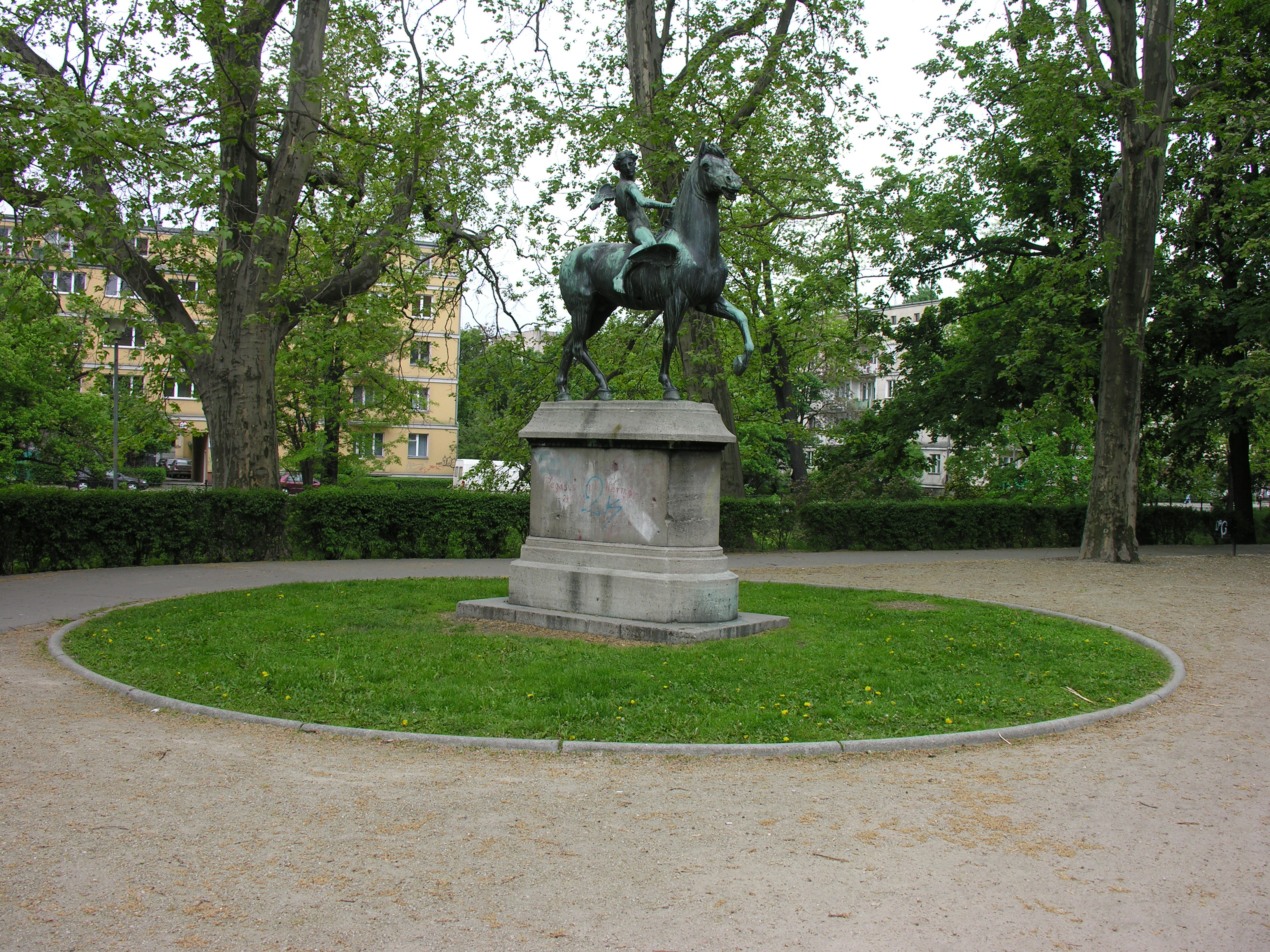 Amor zu Pferde.